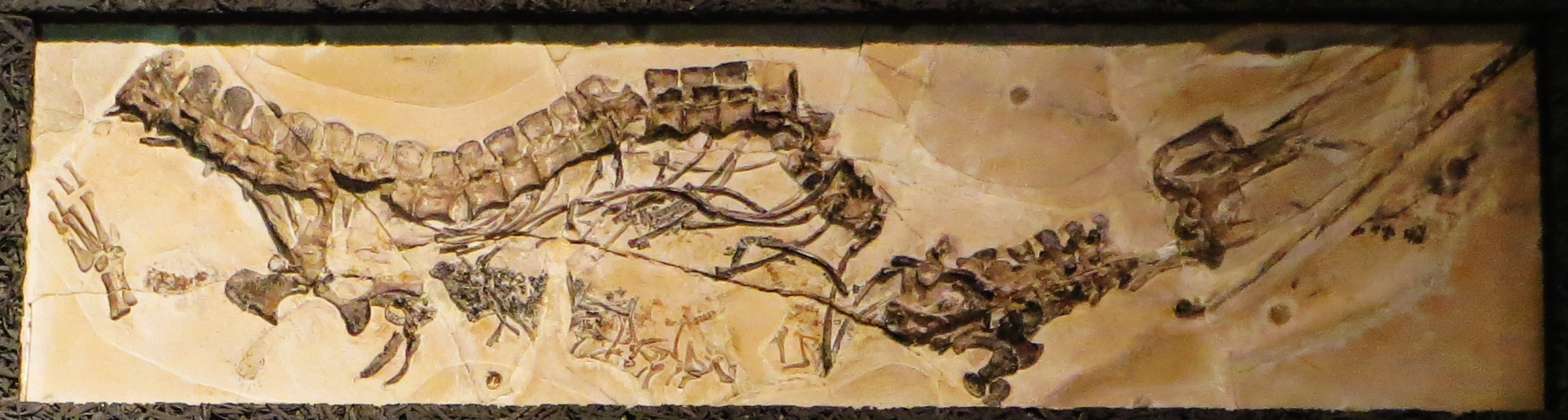 Fossil of Cricosaurus, an extinct reptile - Took the picture at Museum of Paleontology, Tuebingen